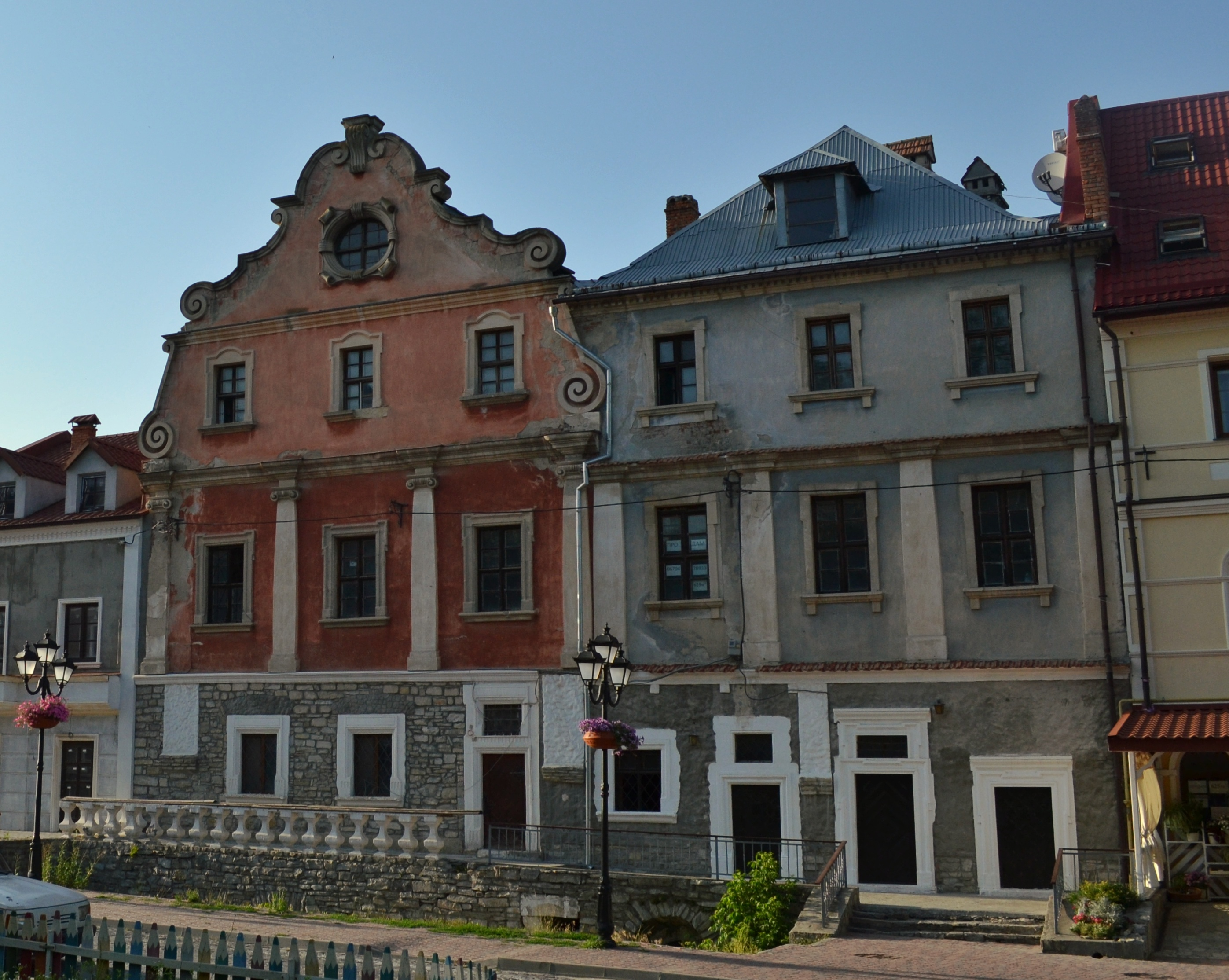 Два будинки, відбудовані за проектами Є. та О. Пламеницьких.